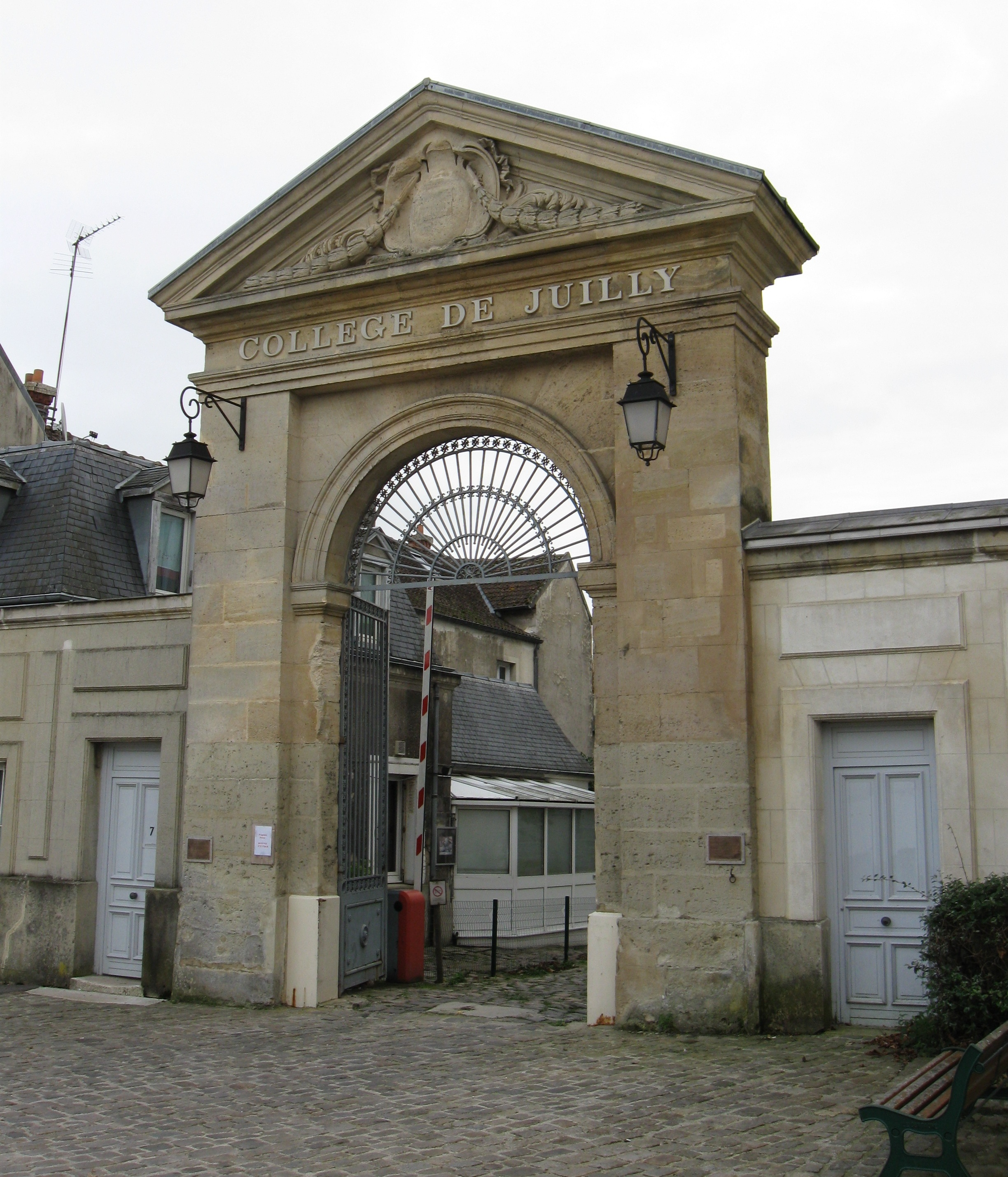 Porche du collège de Juilly. (Seine-et-Marne, région Île-de-France).